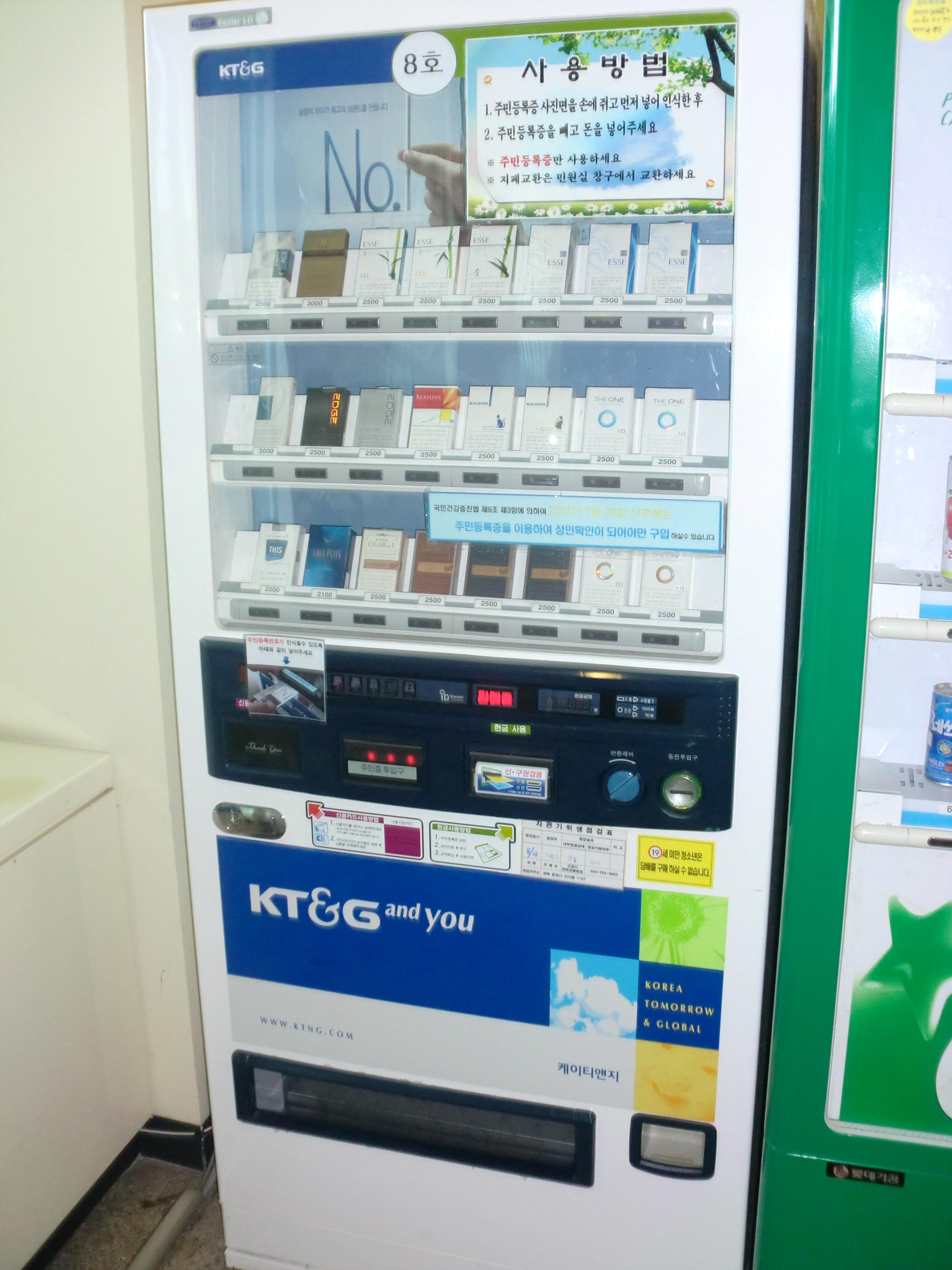 문경운전면허시험장에 있는한국의 담배자동판매기(식별기능부)(